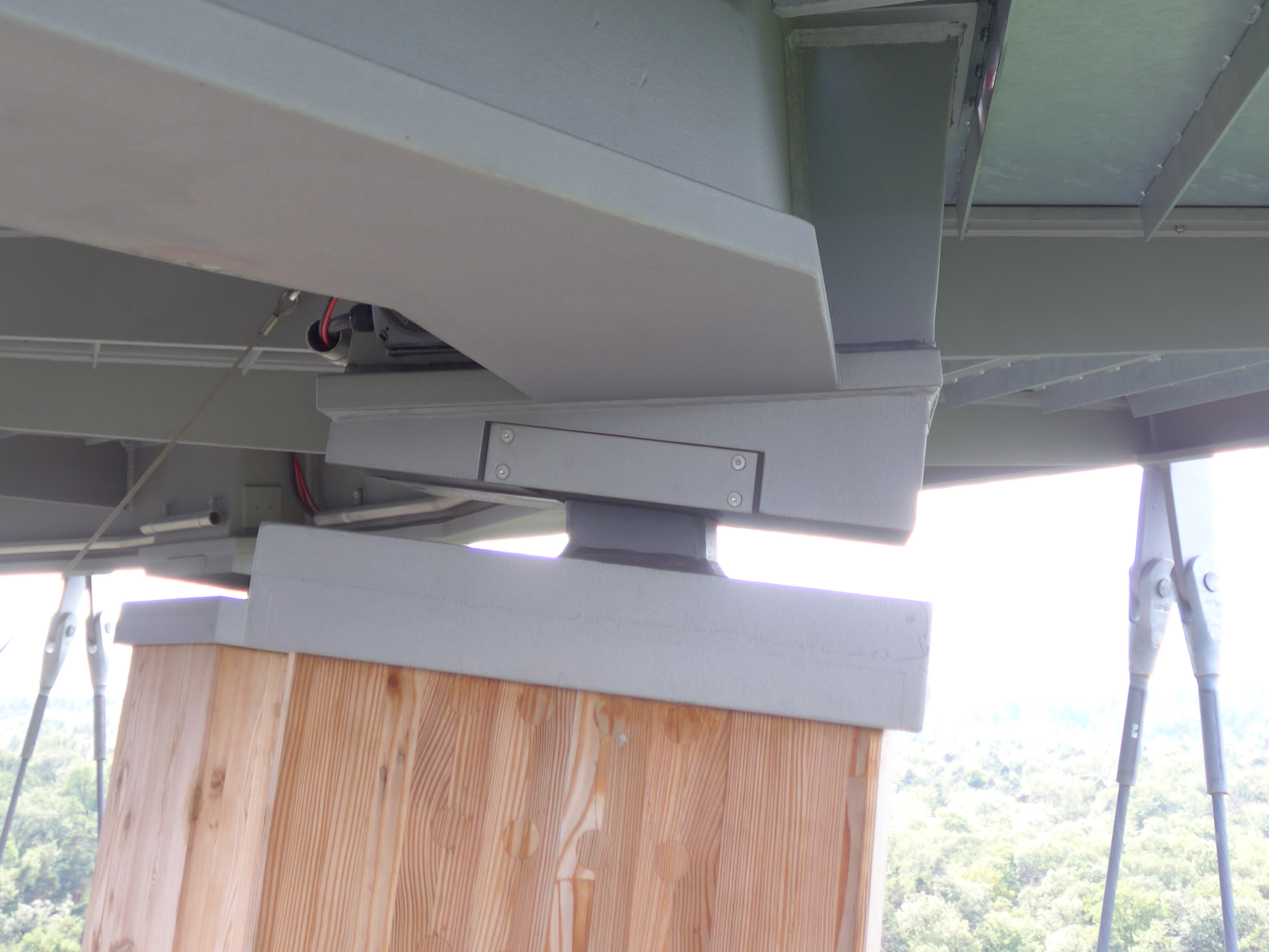 Schönbuchturm, oberste Plattform von unten, Stütze mit Dorn, Aufnahmeblock mit Mechanik für Stützentausch